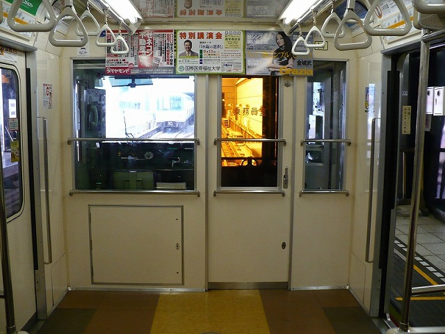 01系の乗務員室仕切壁